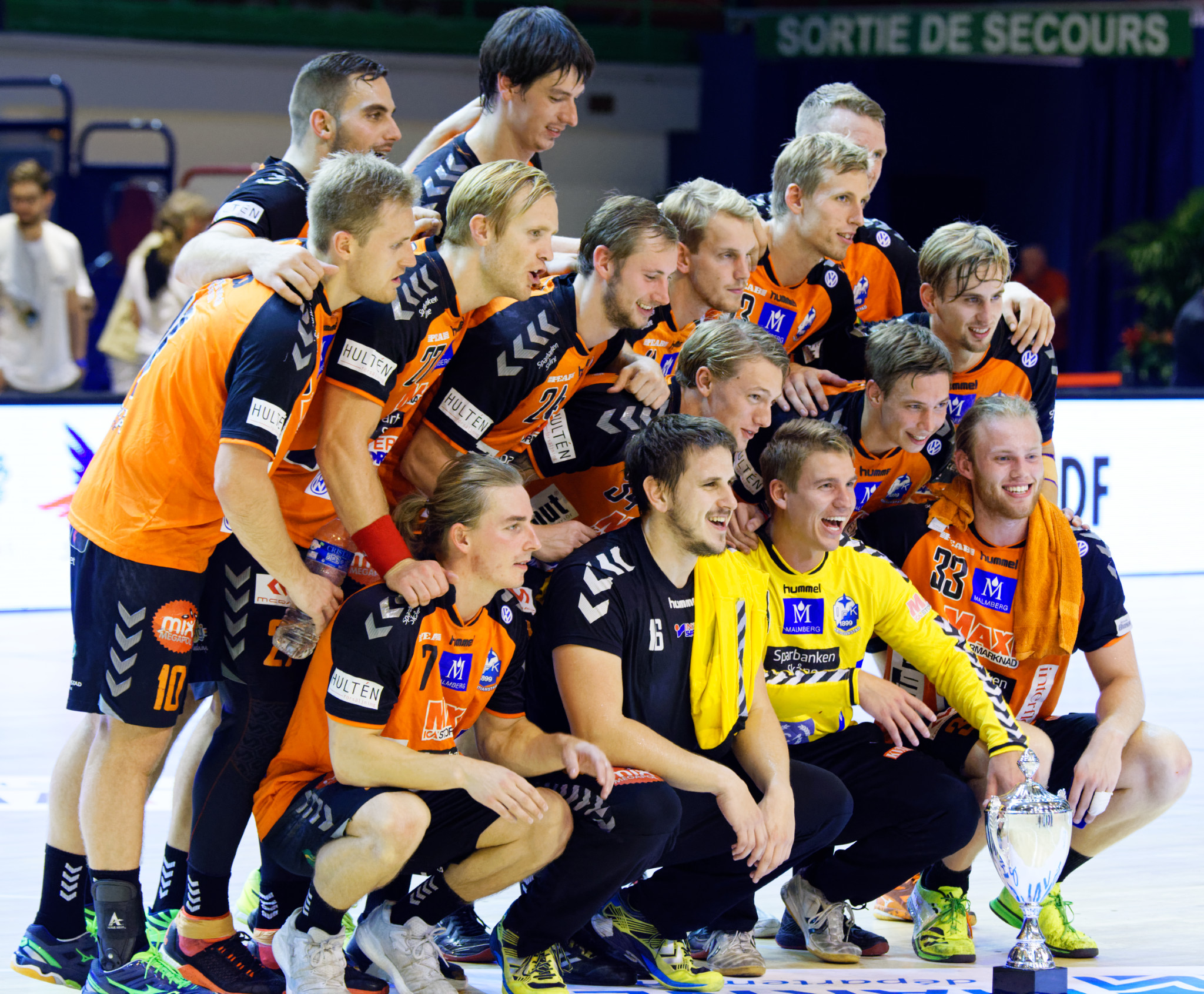 Rencontre du challenge Marrane 2016 entre l'US Ivry et les danois de IFK Kristianstad. A la Halle Carpentier (Paris 13e), le 04 septembre 2016.